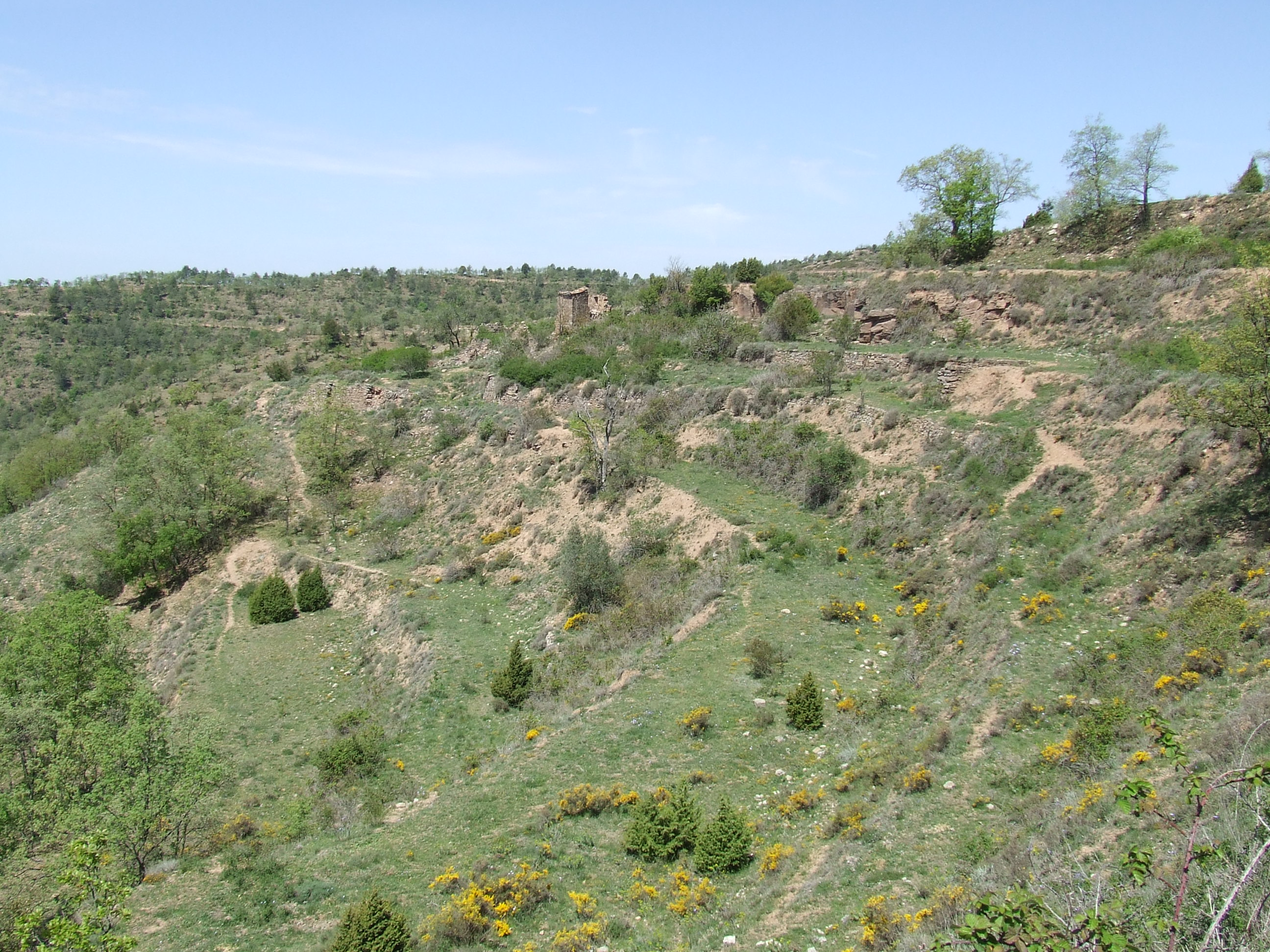 El Masot (l'Estany, Moianès)